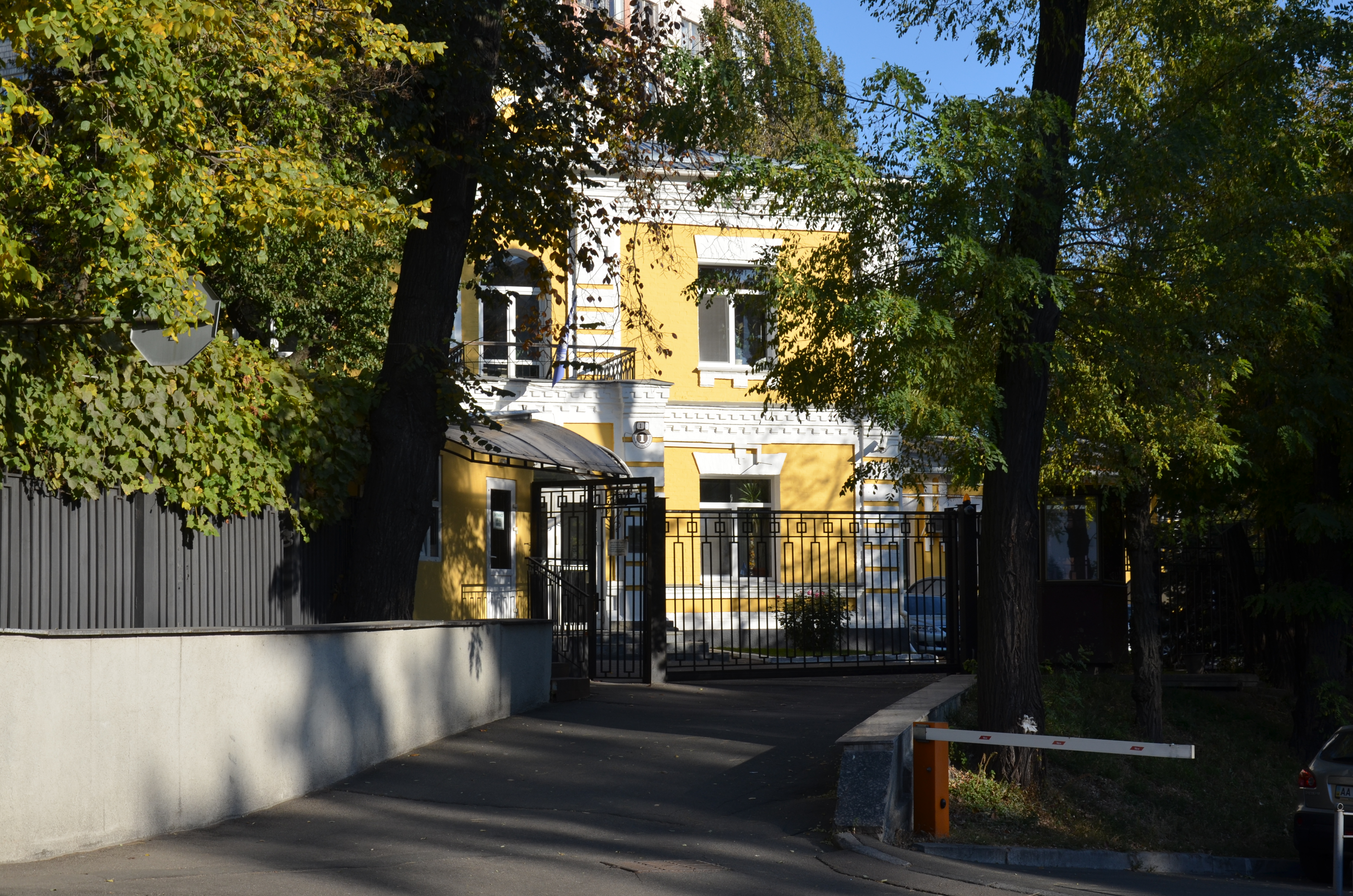 Гуртожиток для сліпих робітниць, Київ, Кловський узвіз, 1